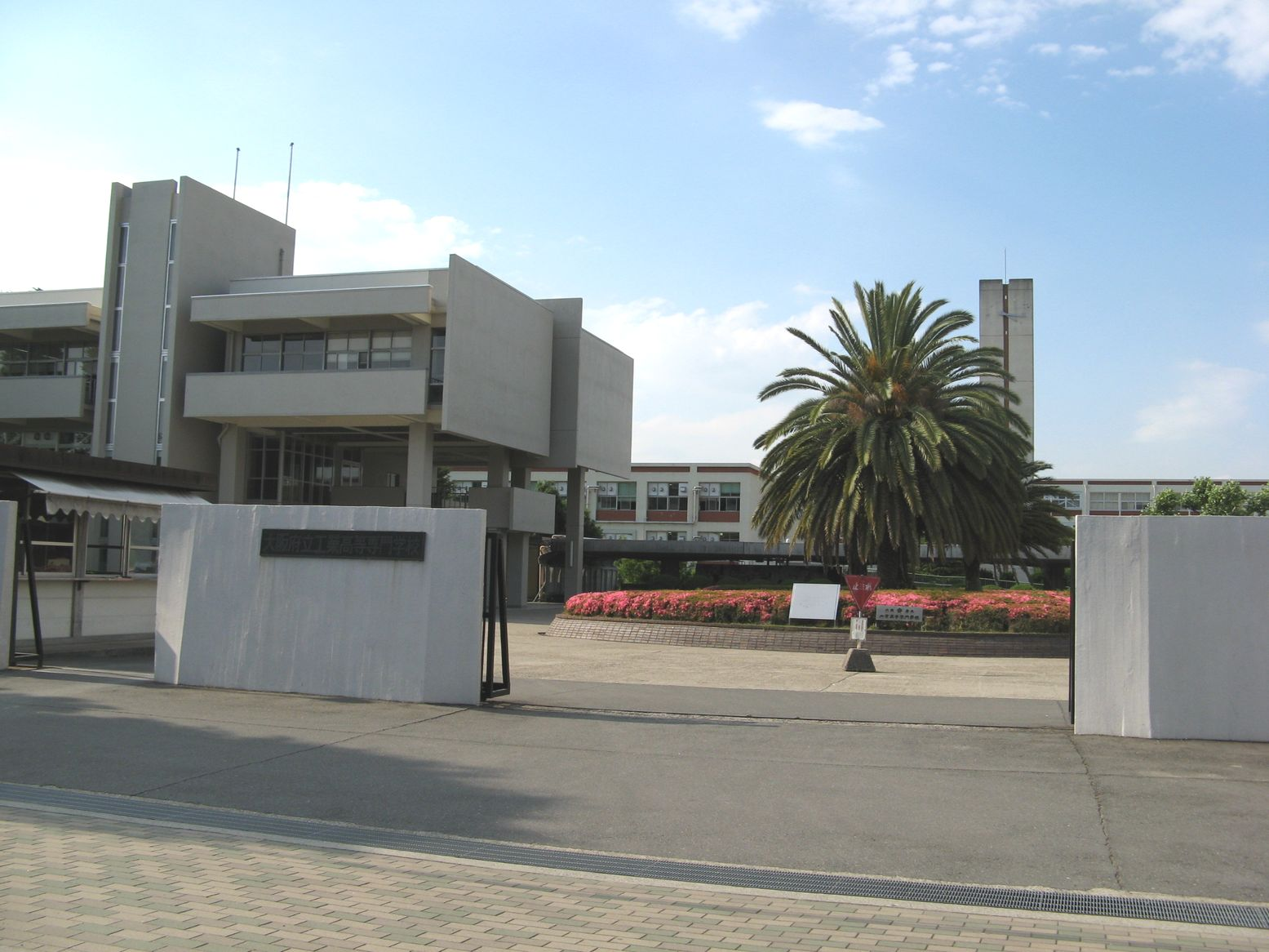 大阪府立工業高等専門学校 2007年6月6日 Bakkai撮影